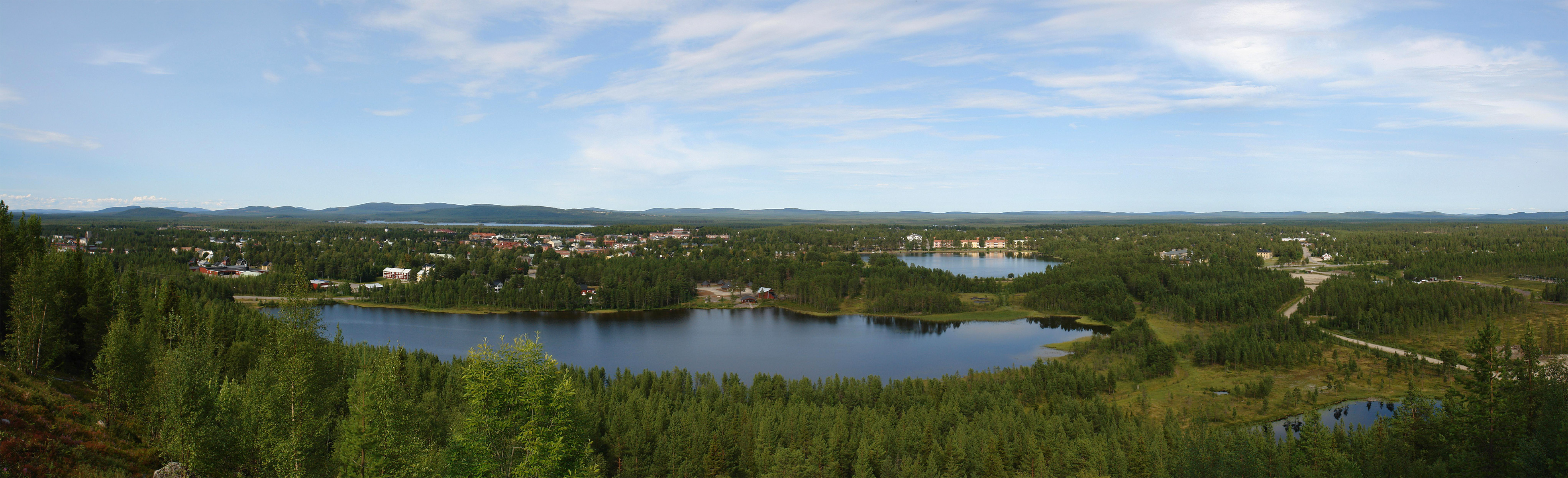 Arvidsjaur (Schweden). Blick vom Lillberget Richtung NO. Panorama aus 4 Einzelbildern erstellt mit Autostitch